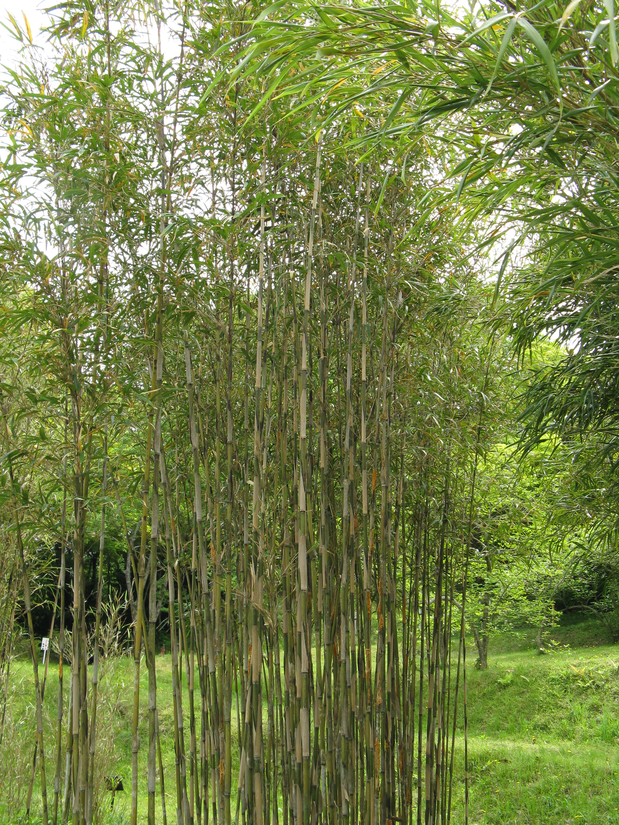 Pleioblastus simonii